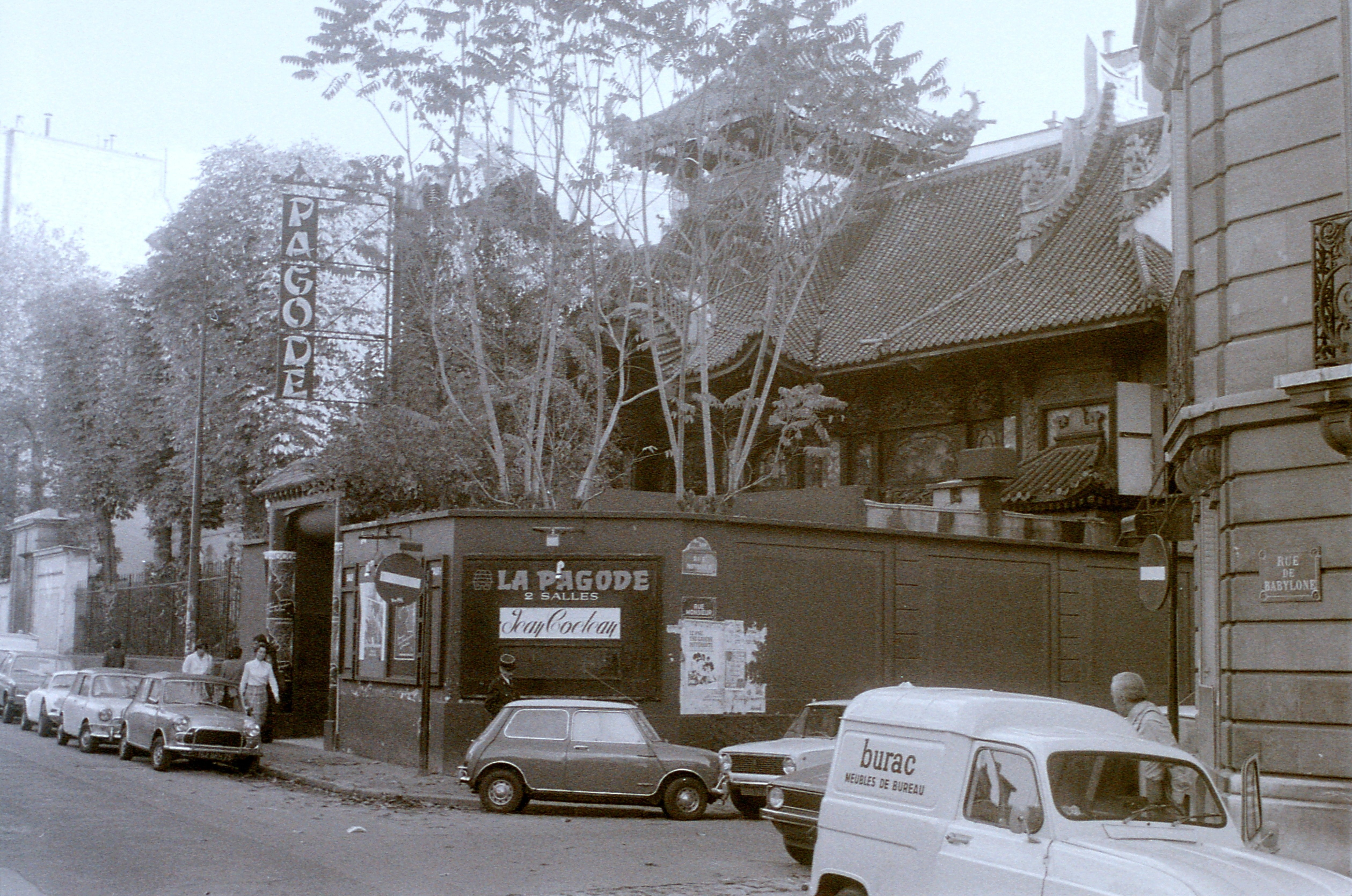 Paris. La Pagode. Foto 1977